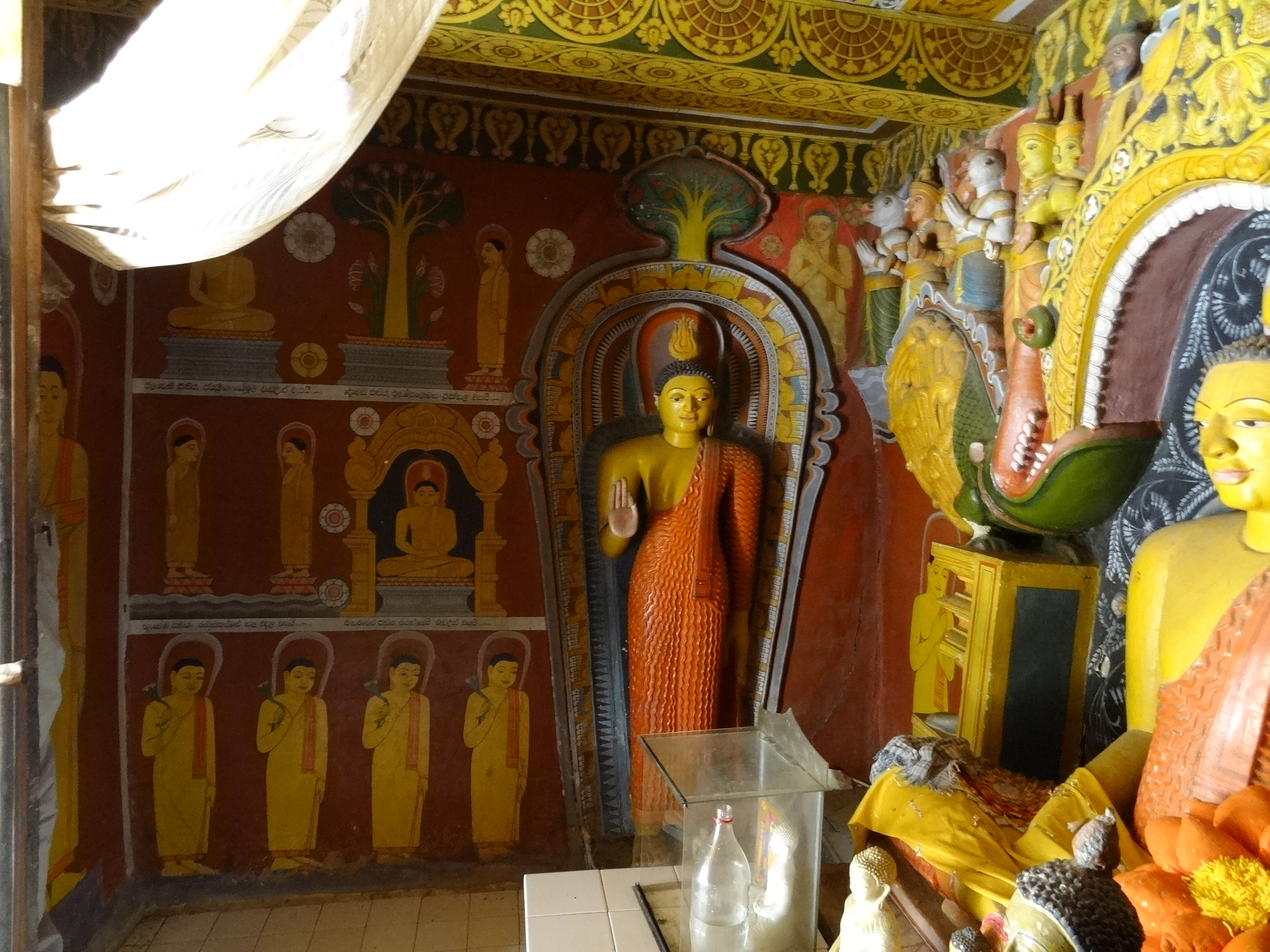 Embekka Devalaya